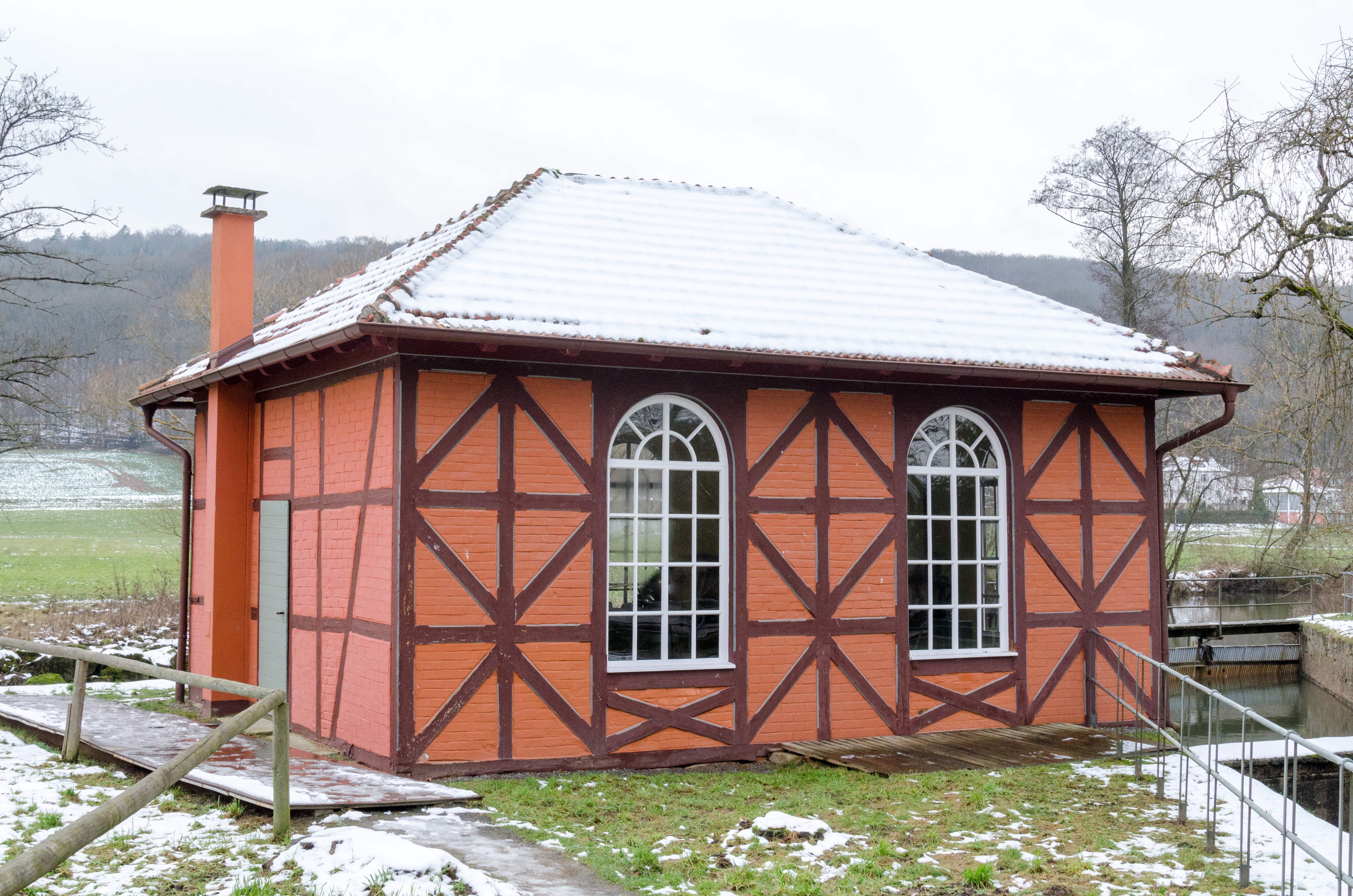 Bad Kissingen, Hausen, Untere Saline, Pumpenhaus